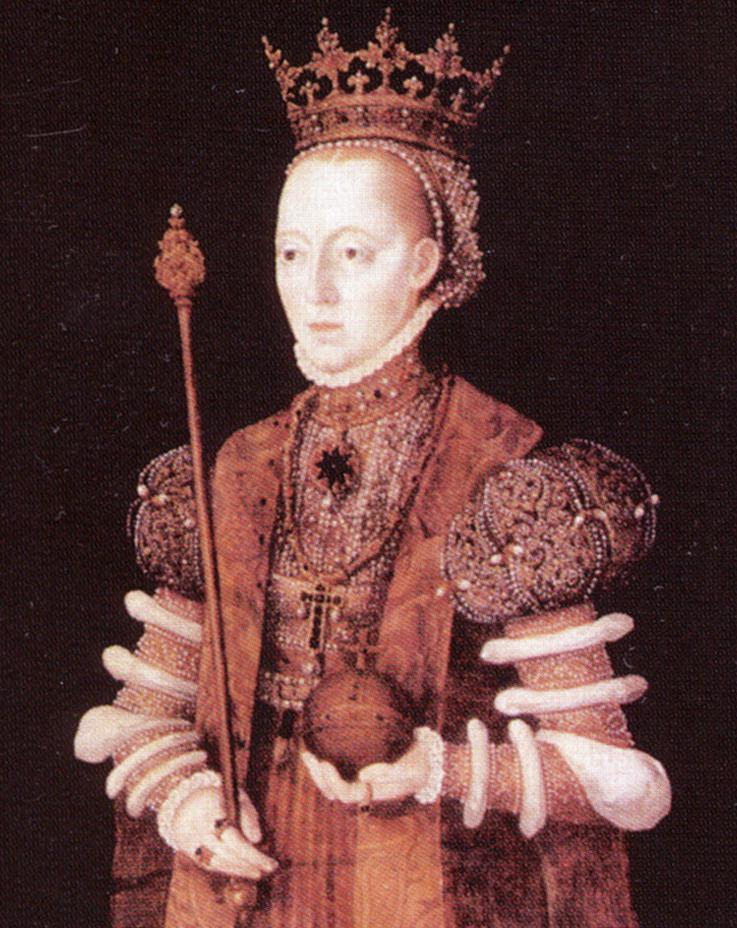 cropped